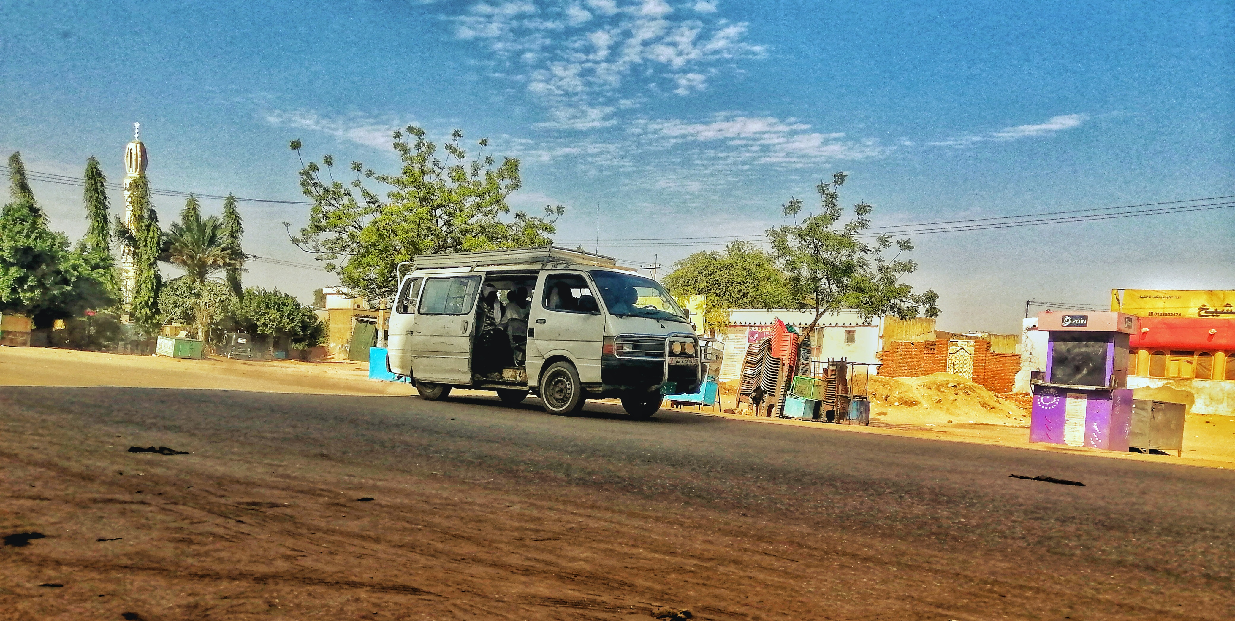 من امام ستديو الوليد This is an image with the theme "Africa on the Move or Transport" from: Sudan